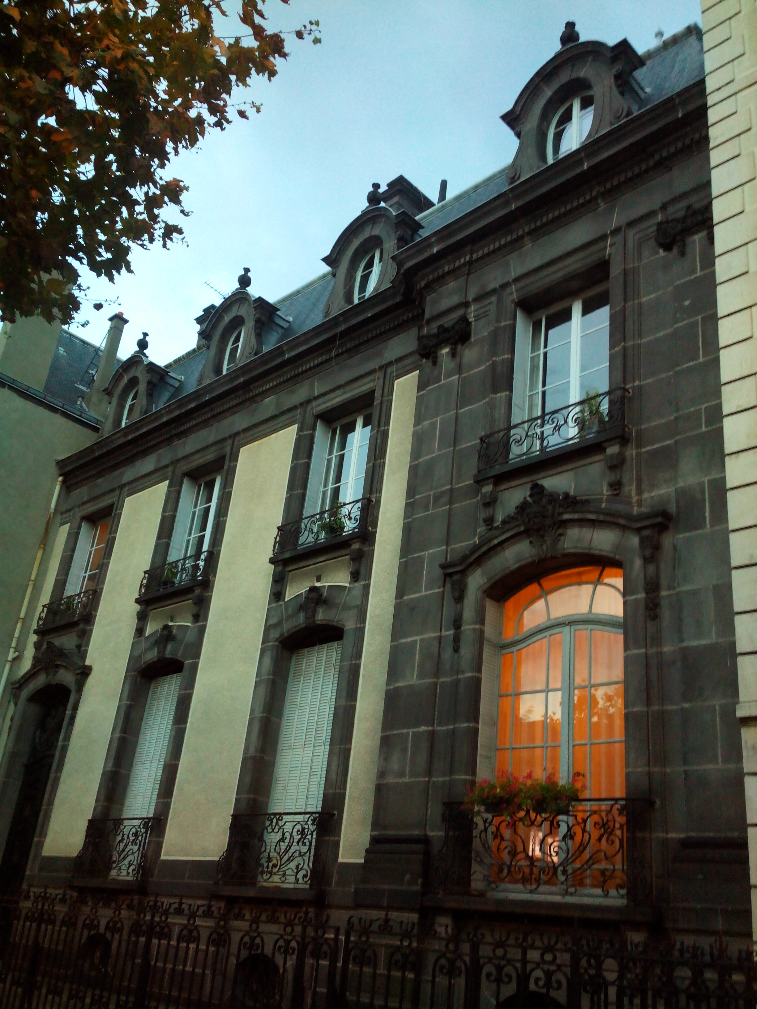 Hôtel Cote-Blatin